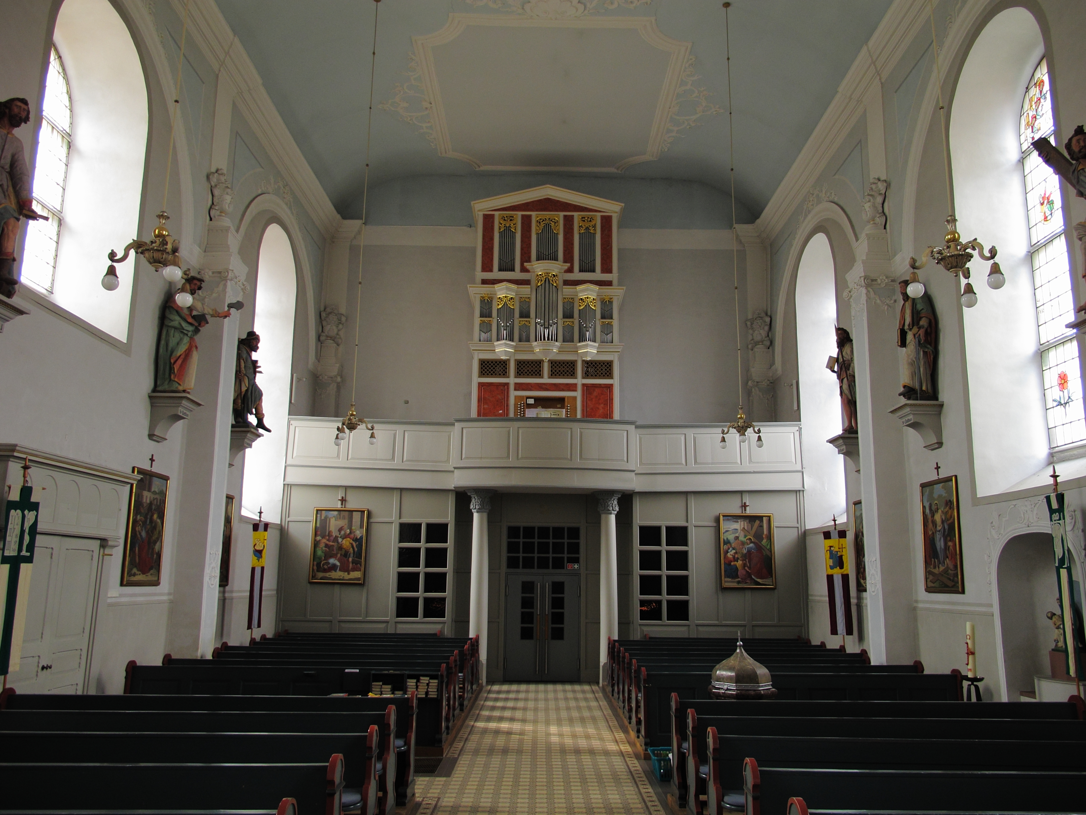 St. Costas und Damian in Groß Düngen (Ortsteil von Bad Salzdetfurth, Niedersachsen): Innenansicht nach Westen